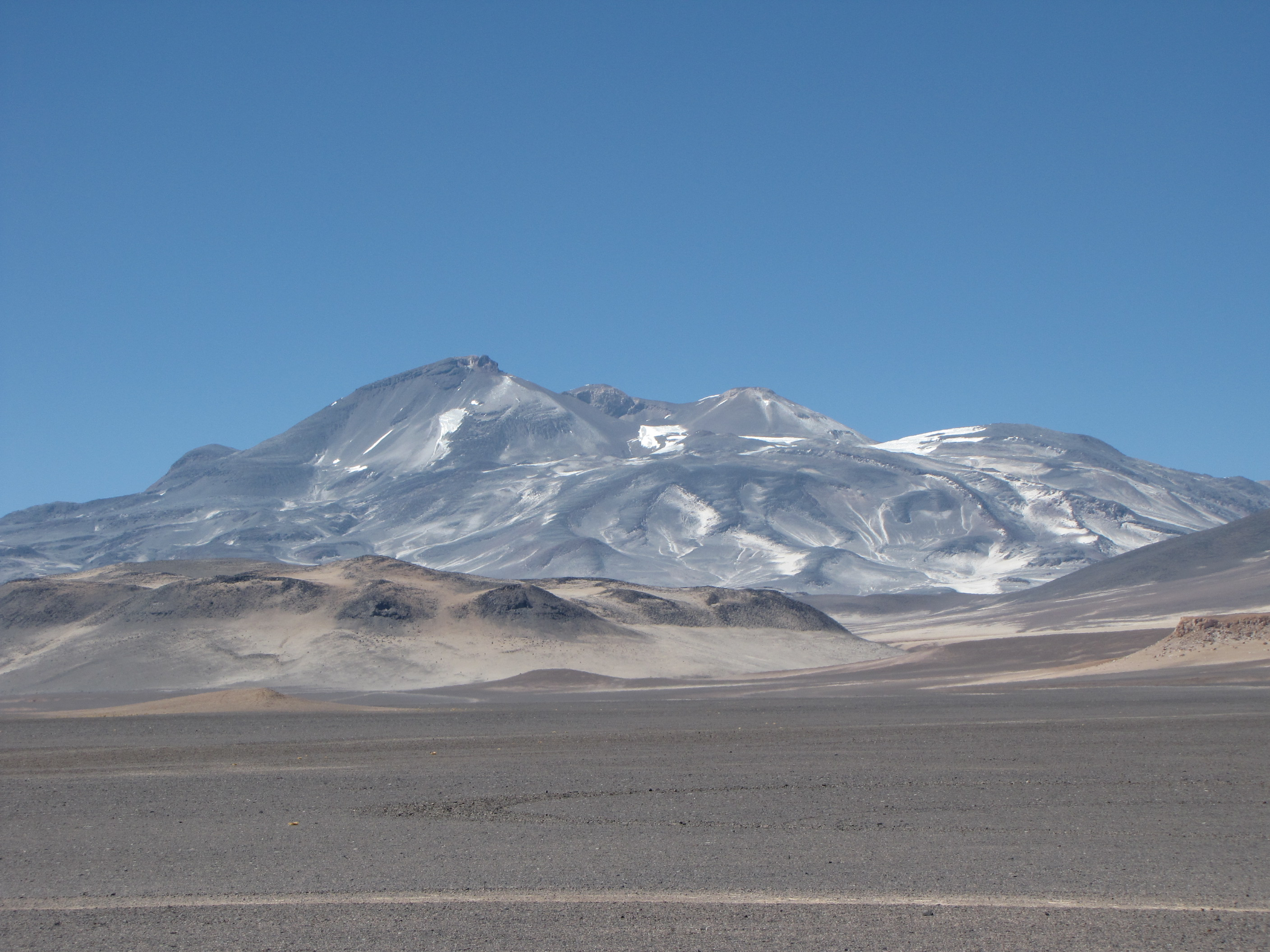 Volcano Ojos del Salado